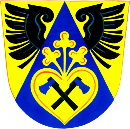 Znak obce Žítková